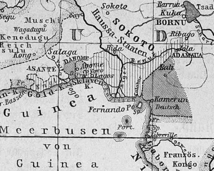 Afrikanische Reiche und europäische Kolonialgebiete am Golf von Guinea um das Jahr 1890.